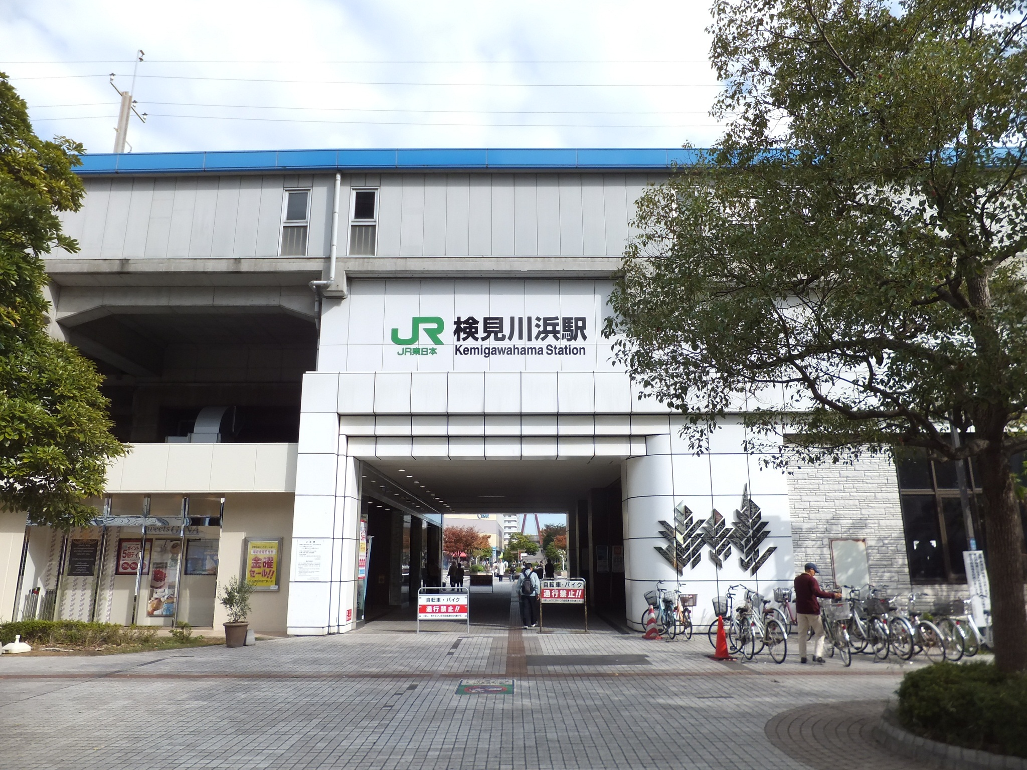 京葉線検見川浜駅南口